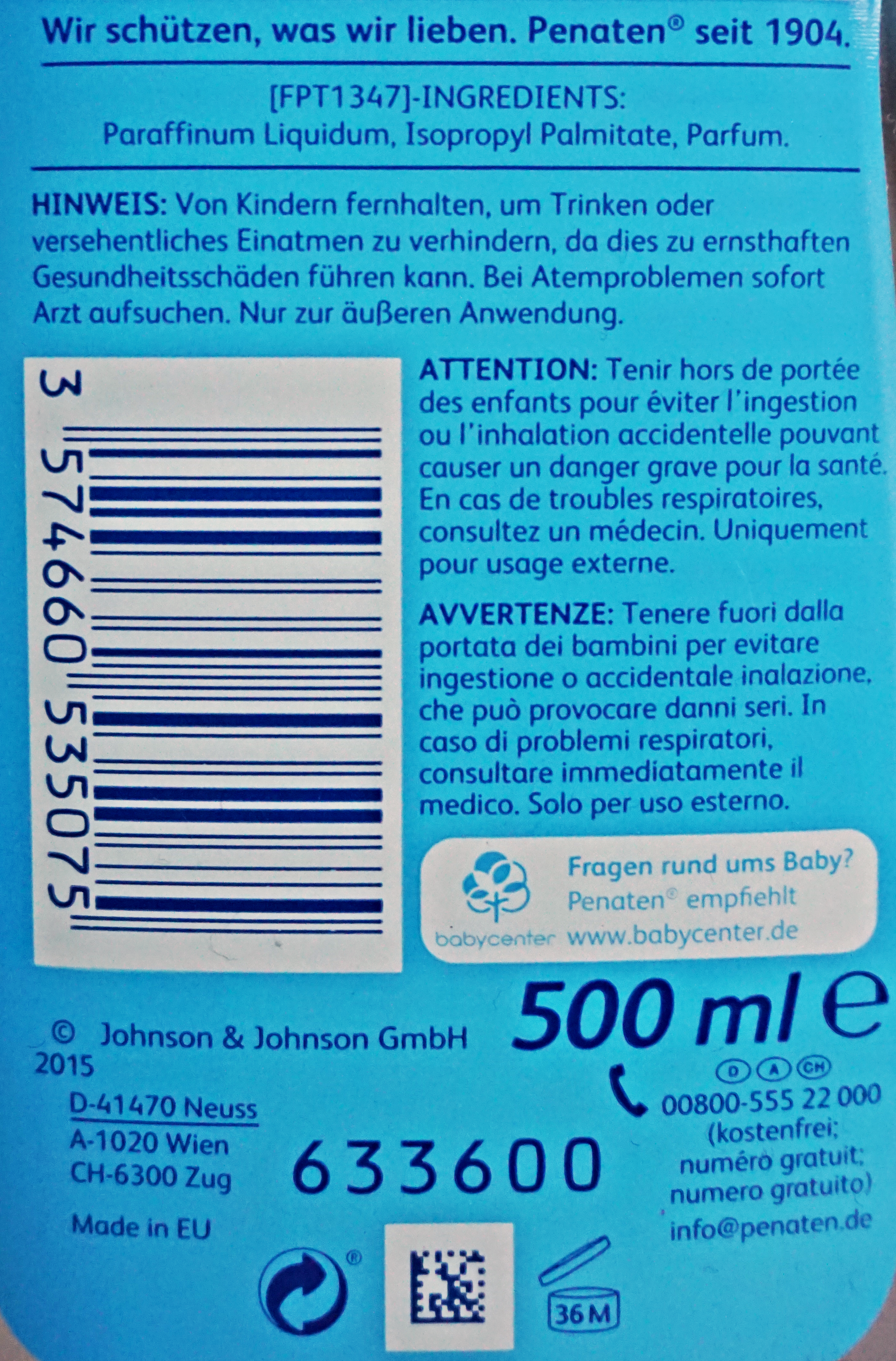 Mineralölbasiertes Babyöl